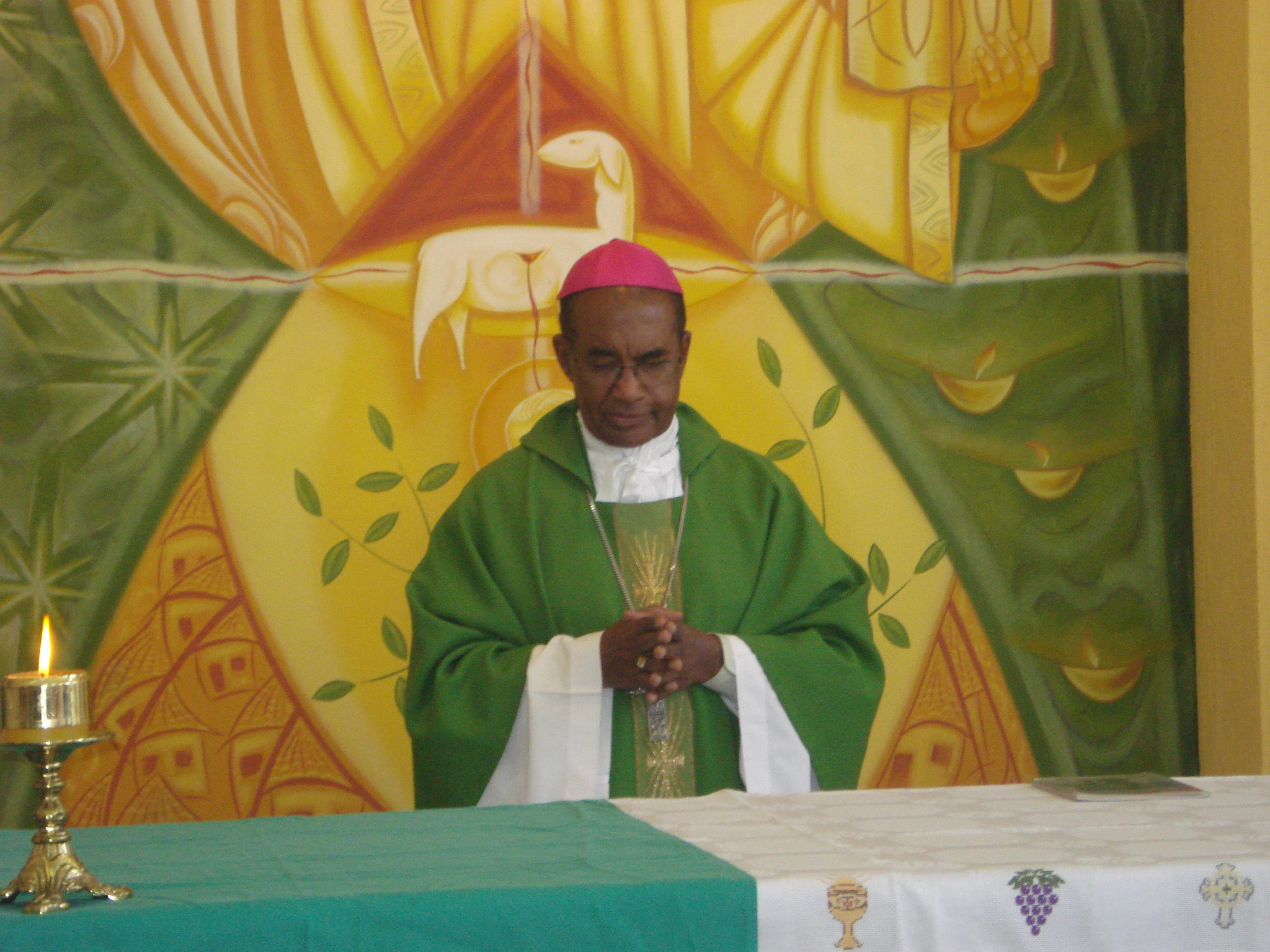 Bispo Dom Aluisio